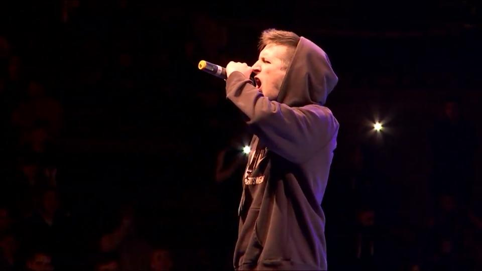 Chuty batallando en RedBullBatallaDeLosGallos 2016 en Madrid